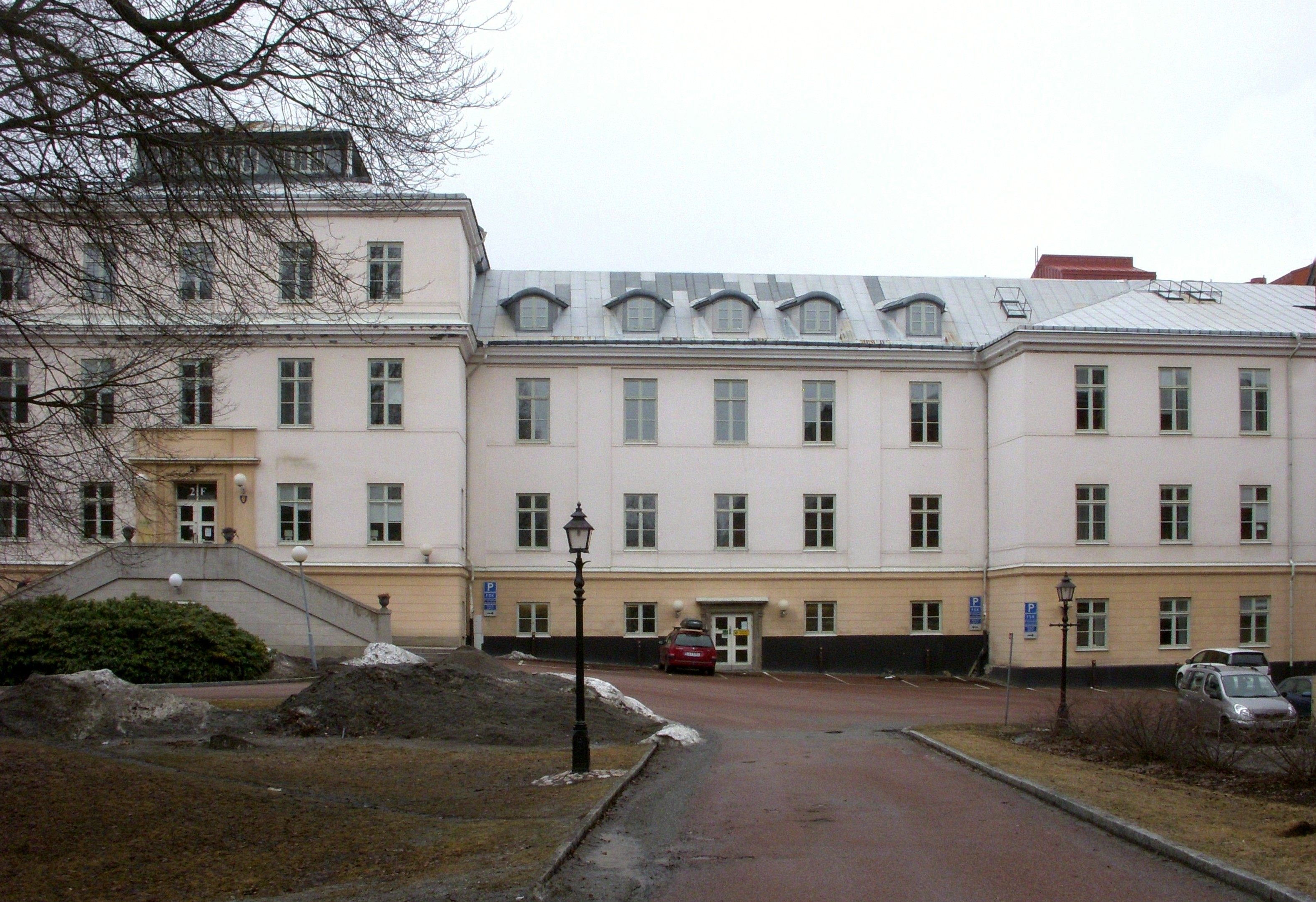 Serafimerlasarettet med delen för den tidigare Gripenhielmska malmgården (även Hornska huset)- fasad mot öst